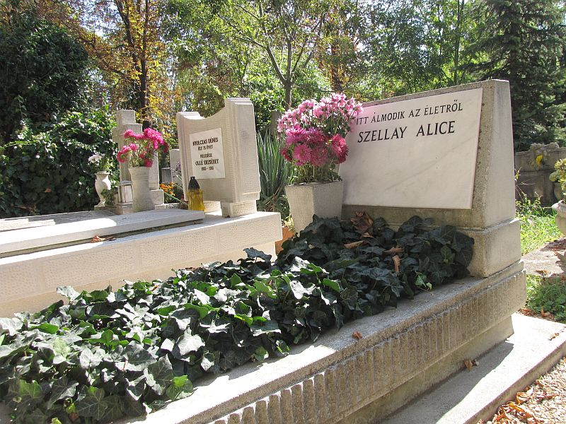 Szellay Alice (1918 - Budapest, 1990. június 27.) filmszínésznő, Pándy Lajos színész feleségének sírja Budapesten. Farkasréti temető: 31-4-79